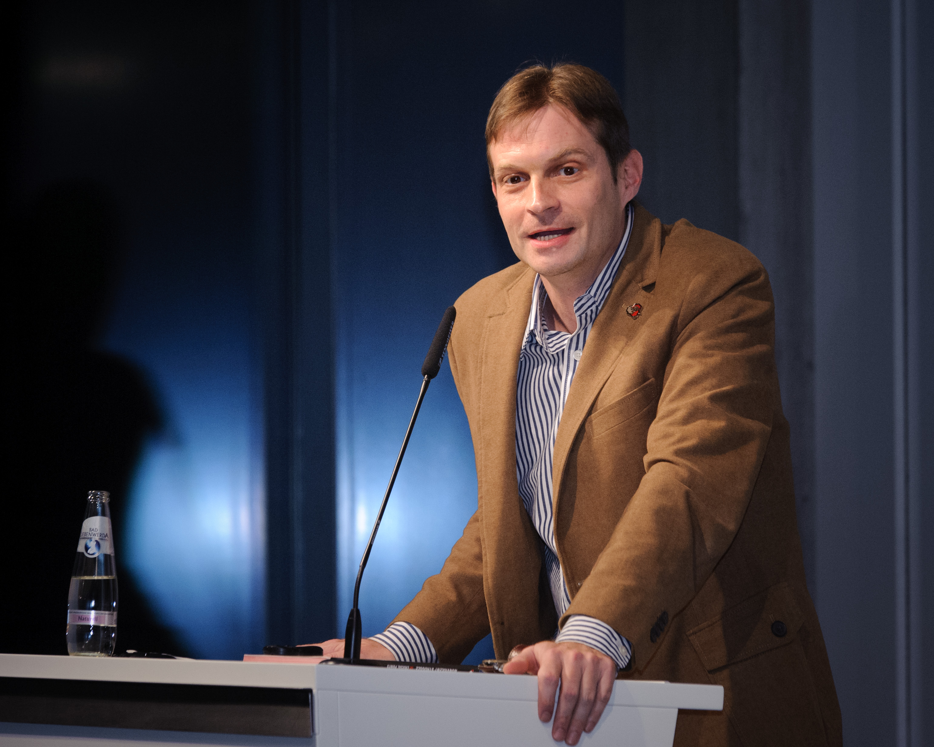 Srdja Popovic (CANVAS, Serbien). Regime Change. Streitgespräch im Rahmen der Vorlesungsreihe "Externe Demokratieförderung und geteilte Zivilgesellschaft" im postsozialistischen Europa, die von Kollegiatinnen des Promotionskollegs Zivilgesellschaft und externe Demokratisierung der Heinrich-Böll-Stiftung organisiert wird.